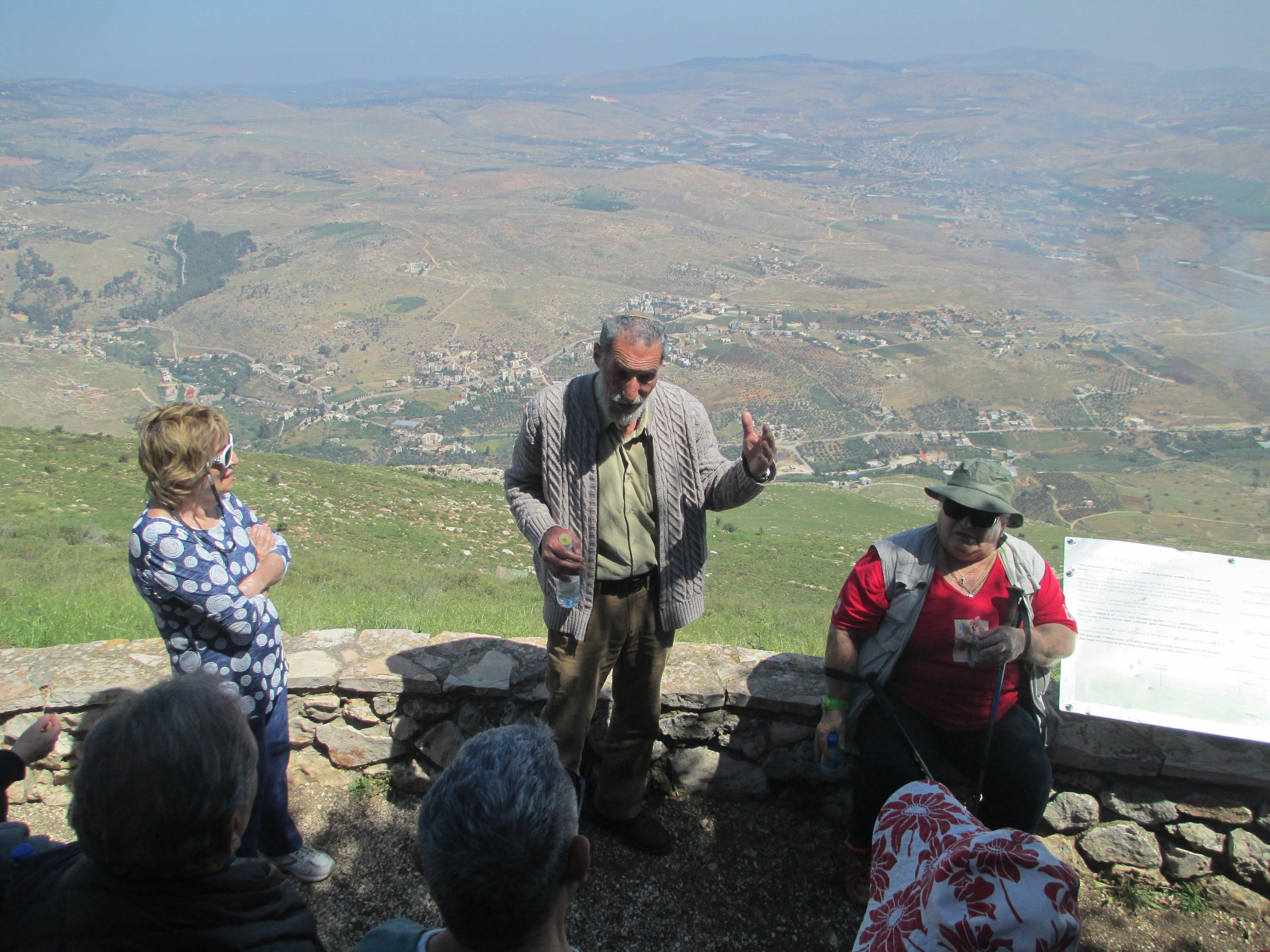 בני קצובר מדריך מטיילים במצפור לונץ על הר כביר